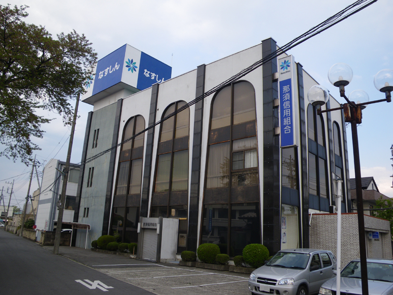 那須信用組合本店。栃木県那須塩原市。